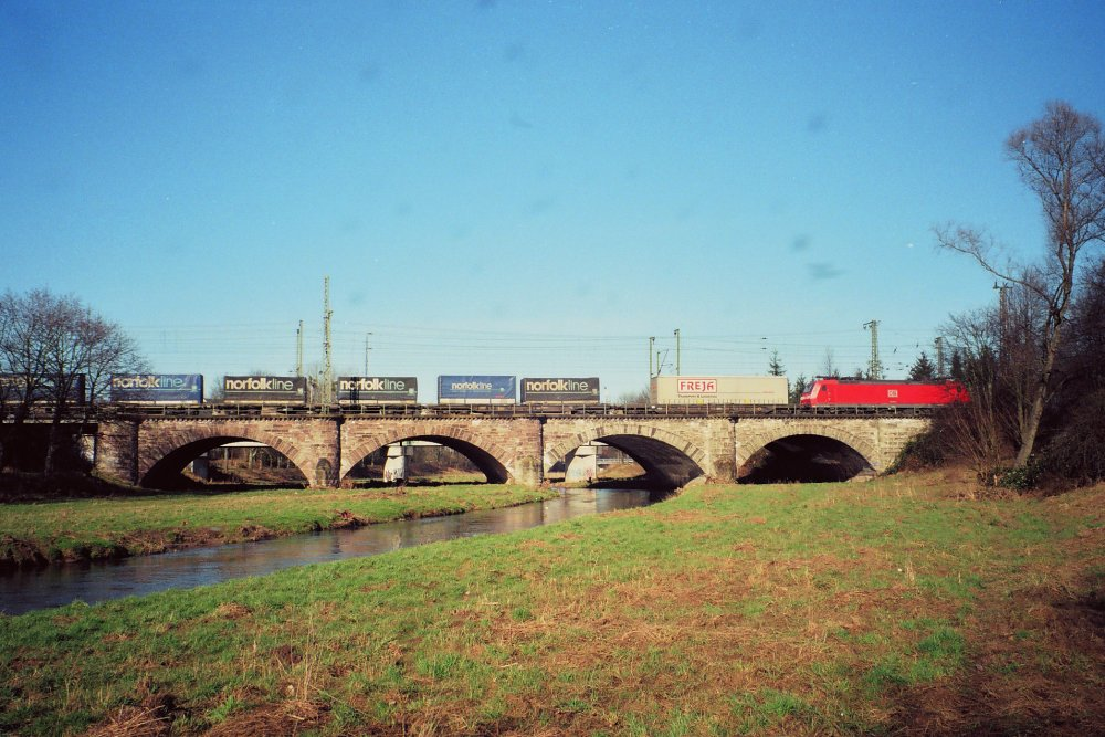 Güterzug Richtung Norden auf der Leinebrücke in Göttingen